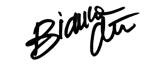 Firma di Bianca Atzei